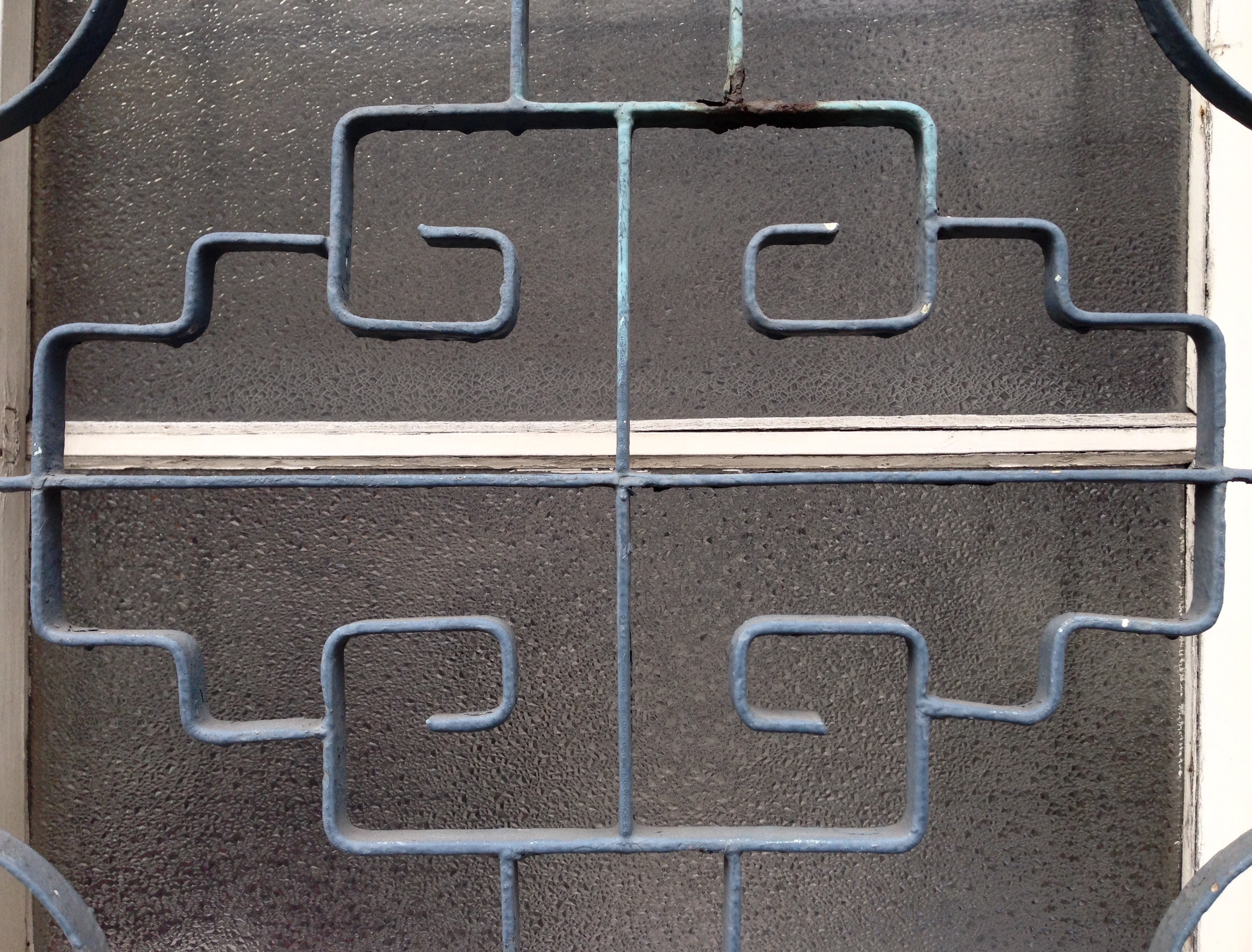 高雄市鳳山區大眾診所鐵窗花